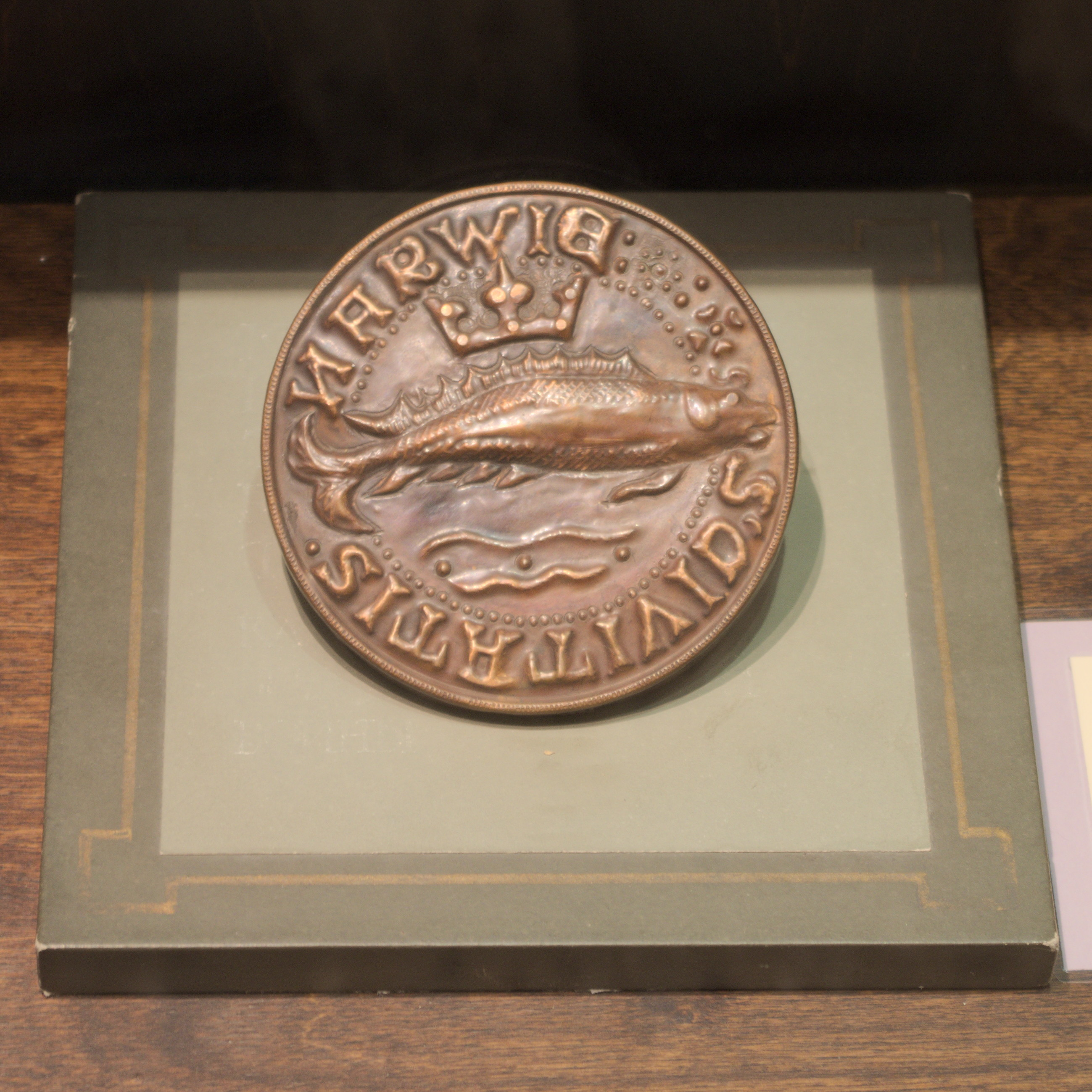 Koopia Narva 1385. a. linnapitsatist.